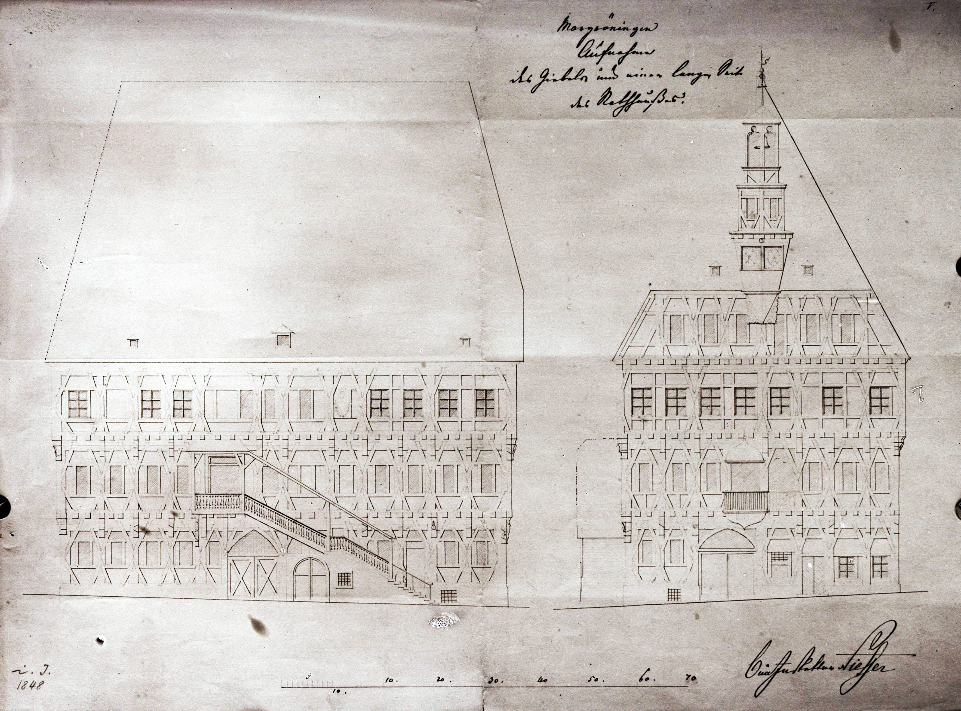 Aufrisse von Süd- und Ostfassade als Bestandsaufnahmen für die Umgestaltung des Markgröninger Rathauses (1848): an der Südfassade mit Sonnenuhr, überdachter Außentreppe, zweitem Portal und Kellerzugang, an der Ostfassade mit überdachtem Verkündbalkon, dezentralem Hauptportal und zusätzlicher Tür neben der Arrestzelle.